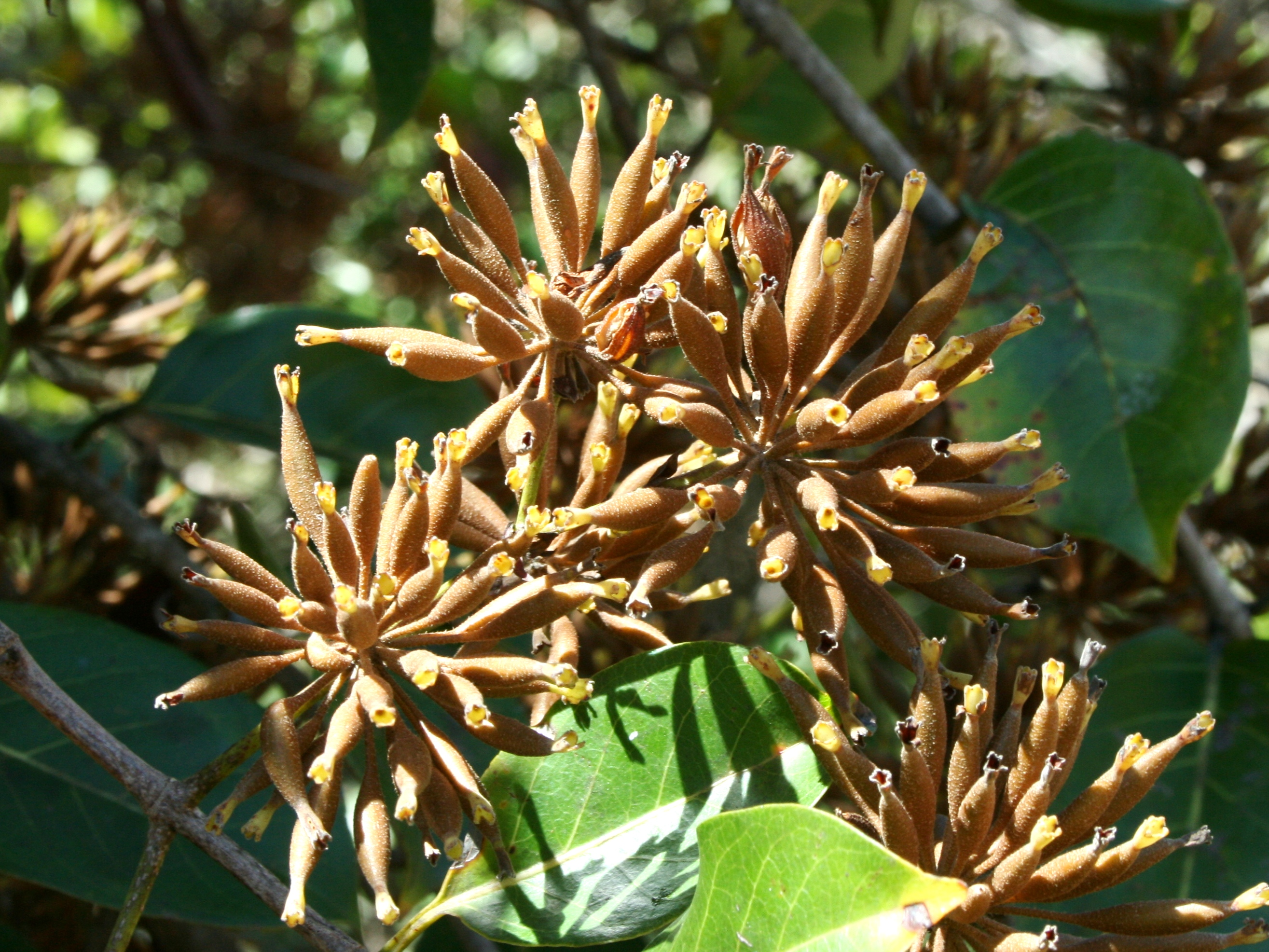 Dozrávající plodenství Uncaria guianensis, Cacuri, Venezuela